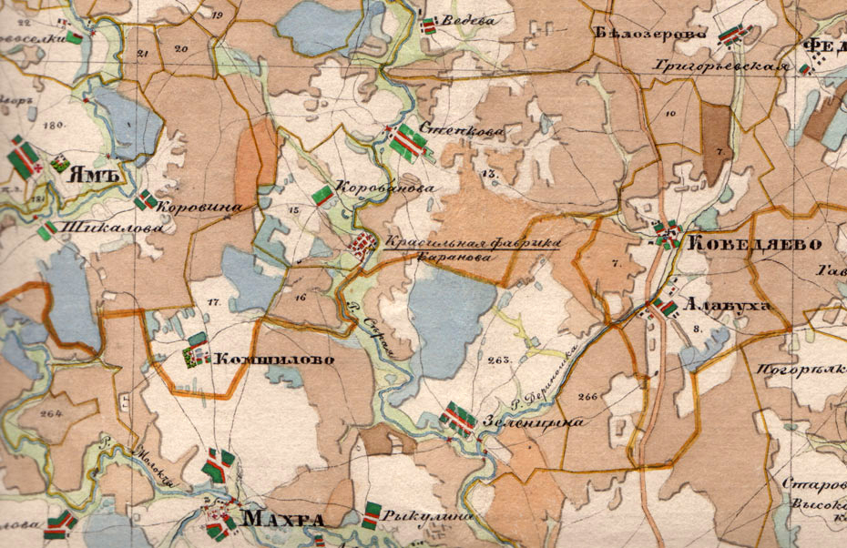 Карабаново на карте Менде А.И., 1850 год